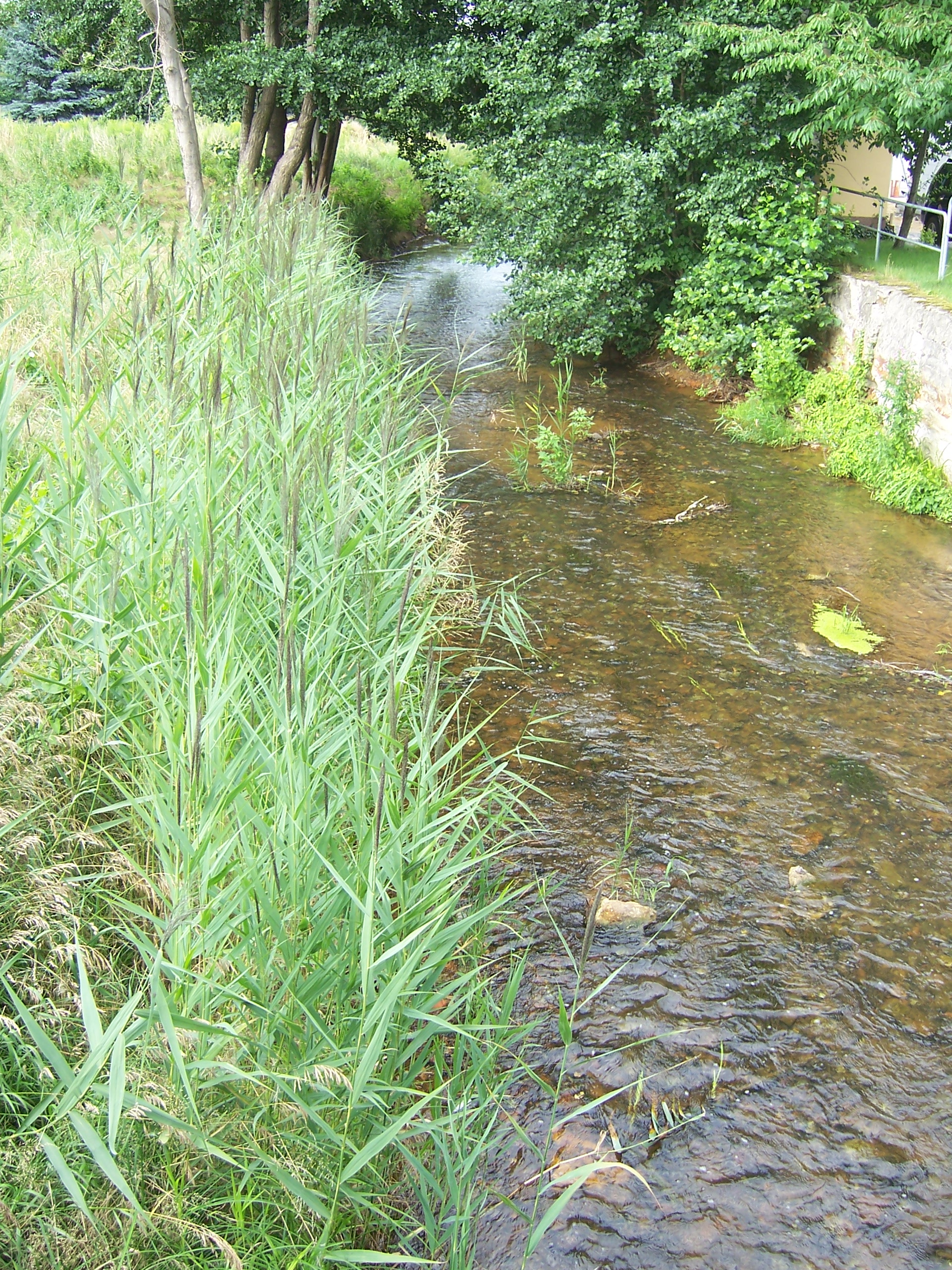 Die Kleine Spree in Burghammer (Gemeinde Spreetal, Sachsen). Map: 51° 29′ N, 14° 22′ E